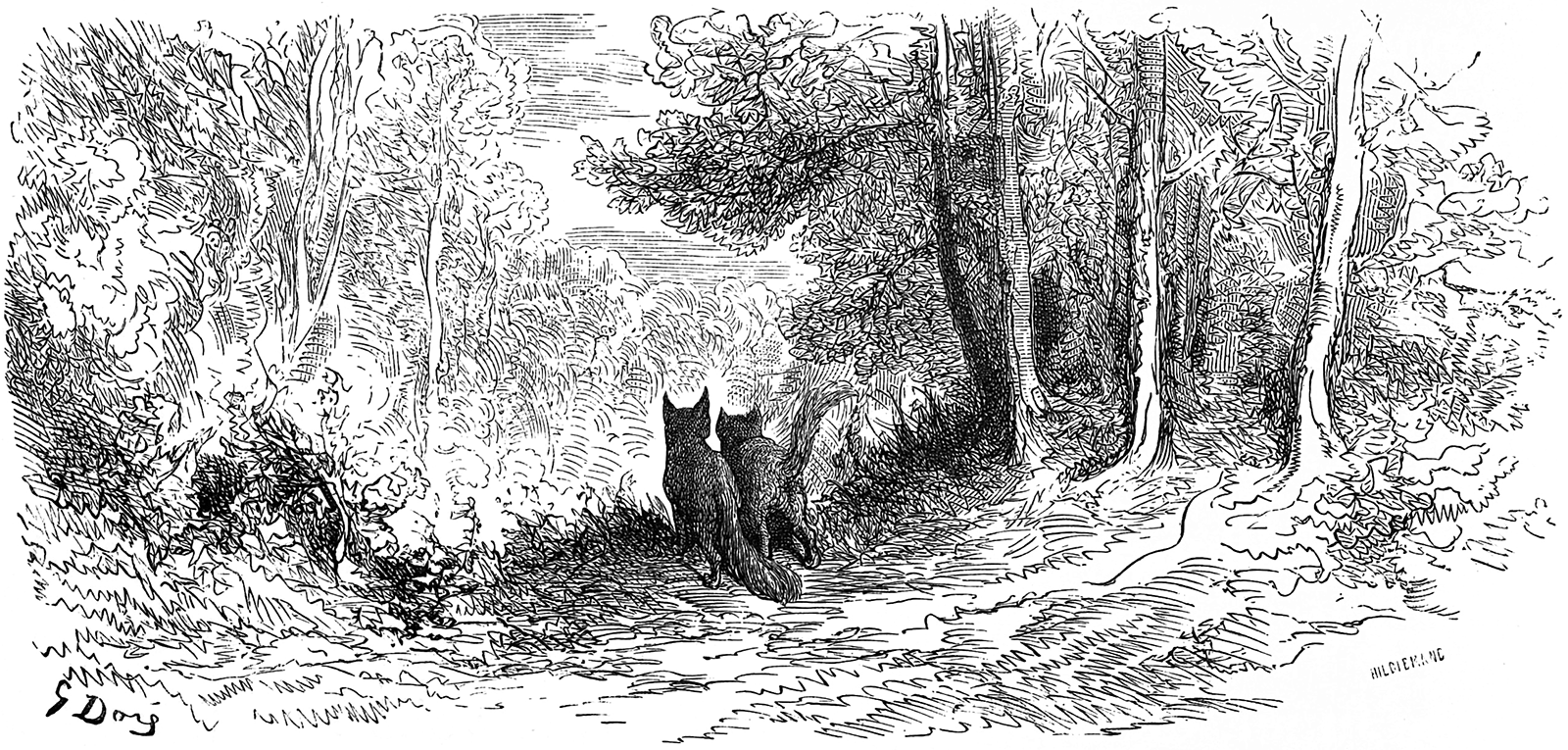 grafika z książki PL Bajki, Jean de La Fontaine, nakładem i drukiem Jana Noskowskiego, Warszawa 1876